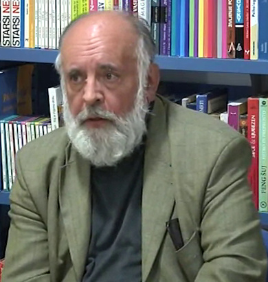 Vinko Ošlak